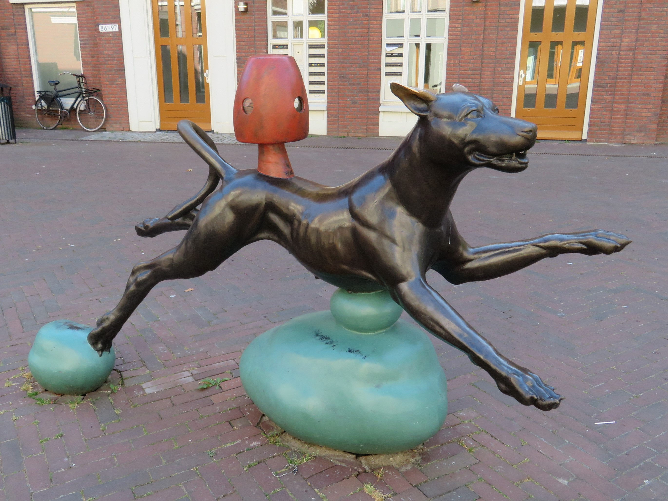 Kunstwerk Damhonden van Hans Kuyper in Leidschendam op het Damplein brons 2015